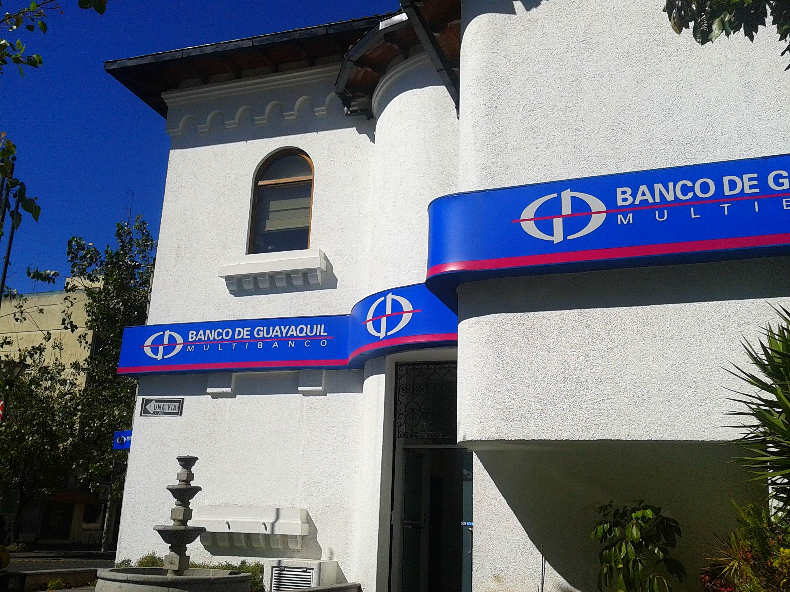 Matriz Microcredito Quito